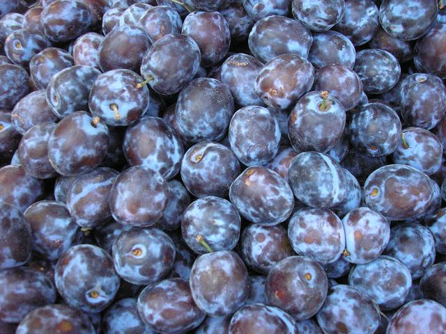 Slivka